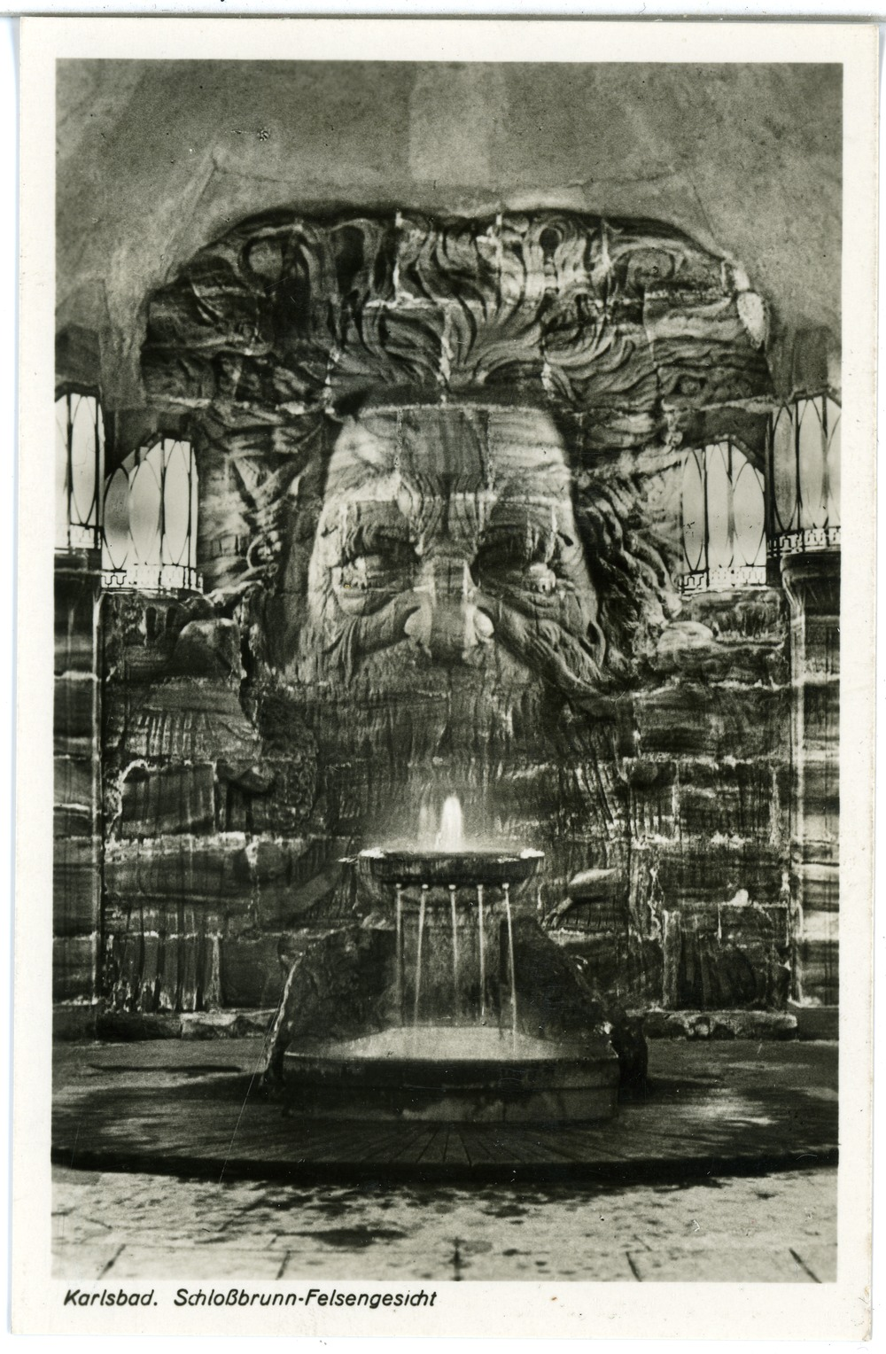 Karlsbad; Schloßbrunn - Felsengesicht This postcard is from publisher Brück & Sohn in Meißen ( postcard has a unique number 25665 and is available in a higher resolution at the publisher. This images was uploaded in a cooperation project between Wikipedians and the publisher.